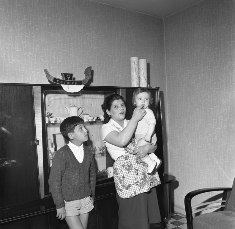 Italienische Gastarbeiter (Bergleute) in Walsum Bergwerksgesellschaft Walsum